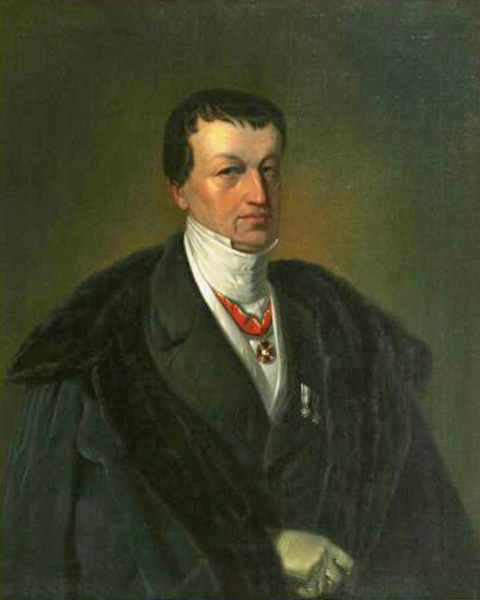 Christian Gottlob Frege III (1778-1855) auf einem Ölbild von Friedrich Pecht